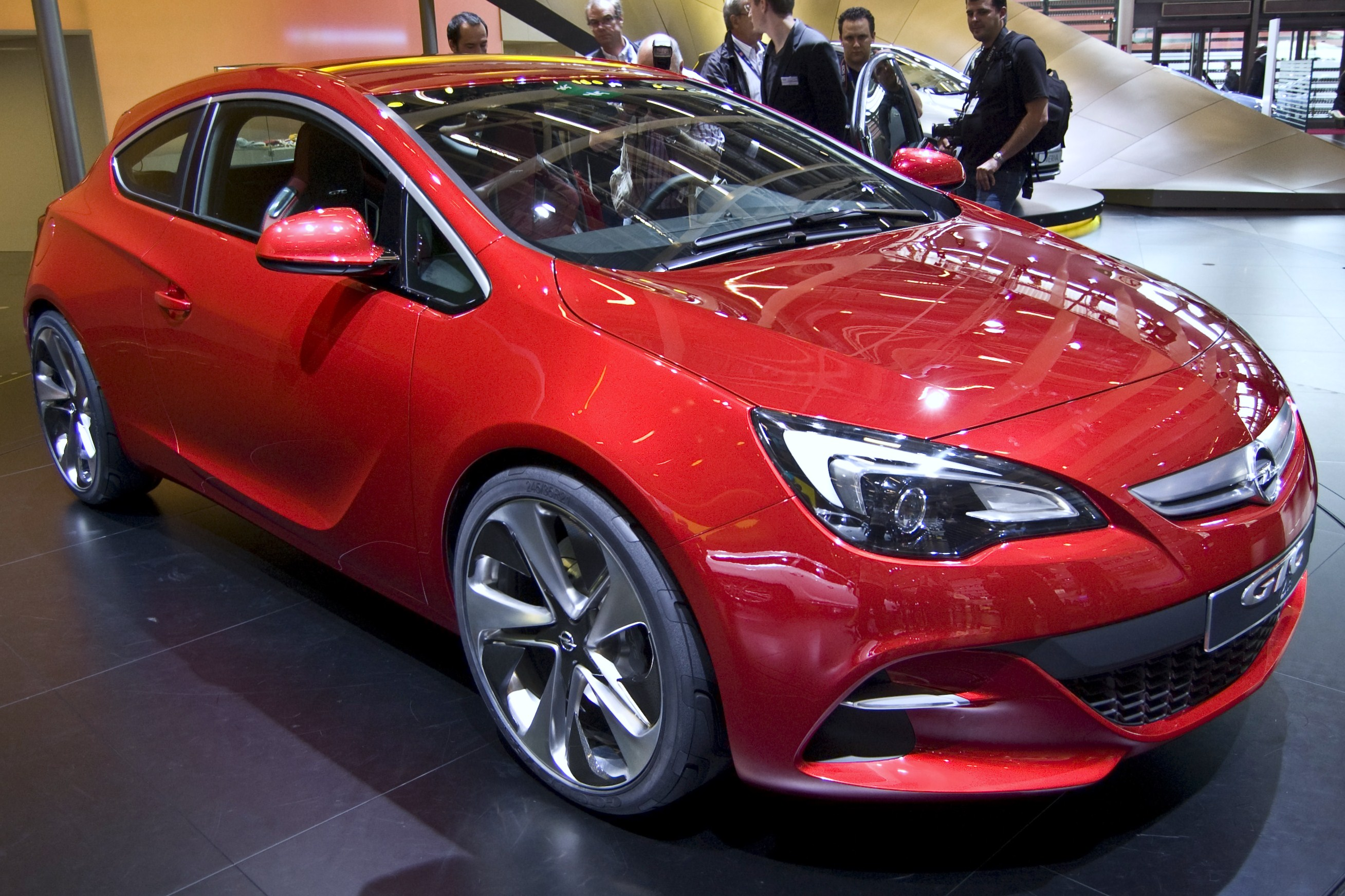 Prototipo Opel Astra GTC Paris Concept en el Salón de París 2010